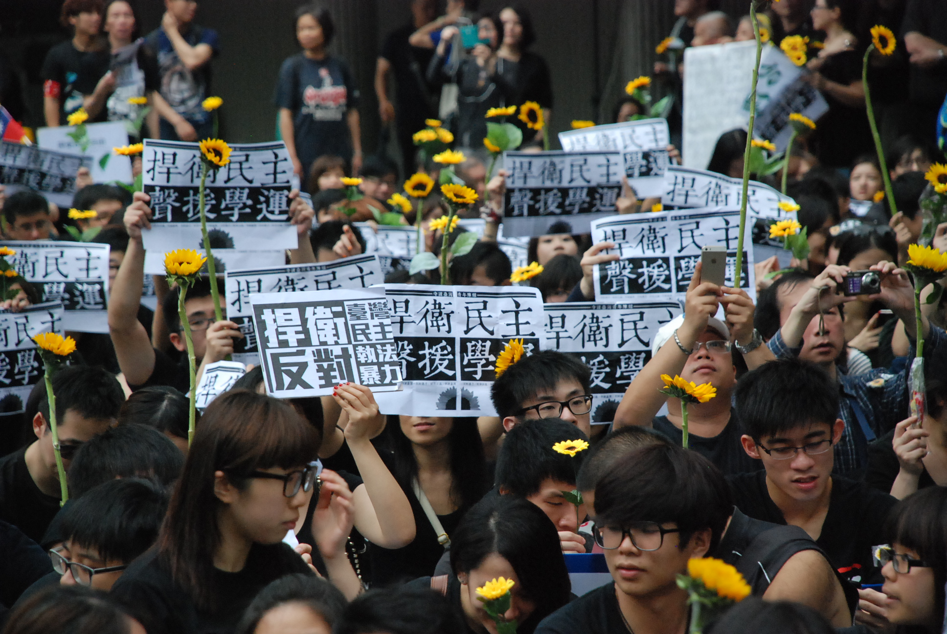 參與集會的人士手持象徵台灣反服貿的太陽花及反暴力執法標語 (美國之音湯惠芸拍攝)